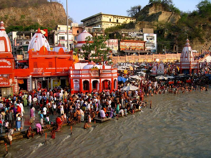 Ganga Dashara, at Har-ki-Pauri, Haridwar.